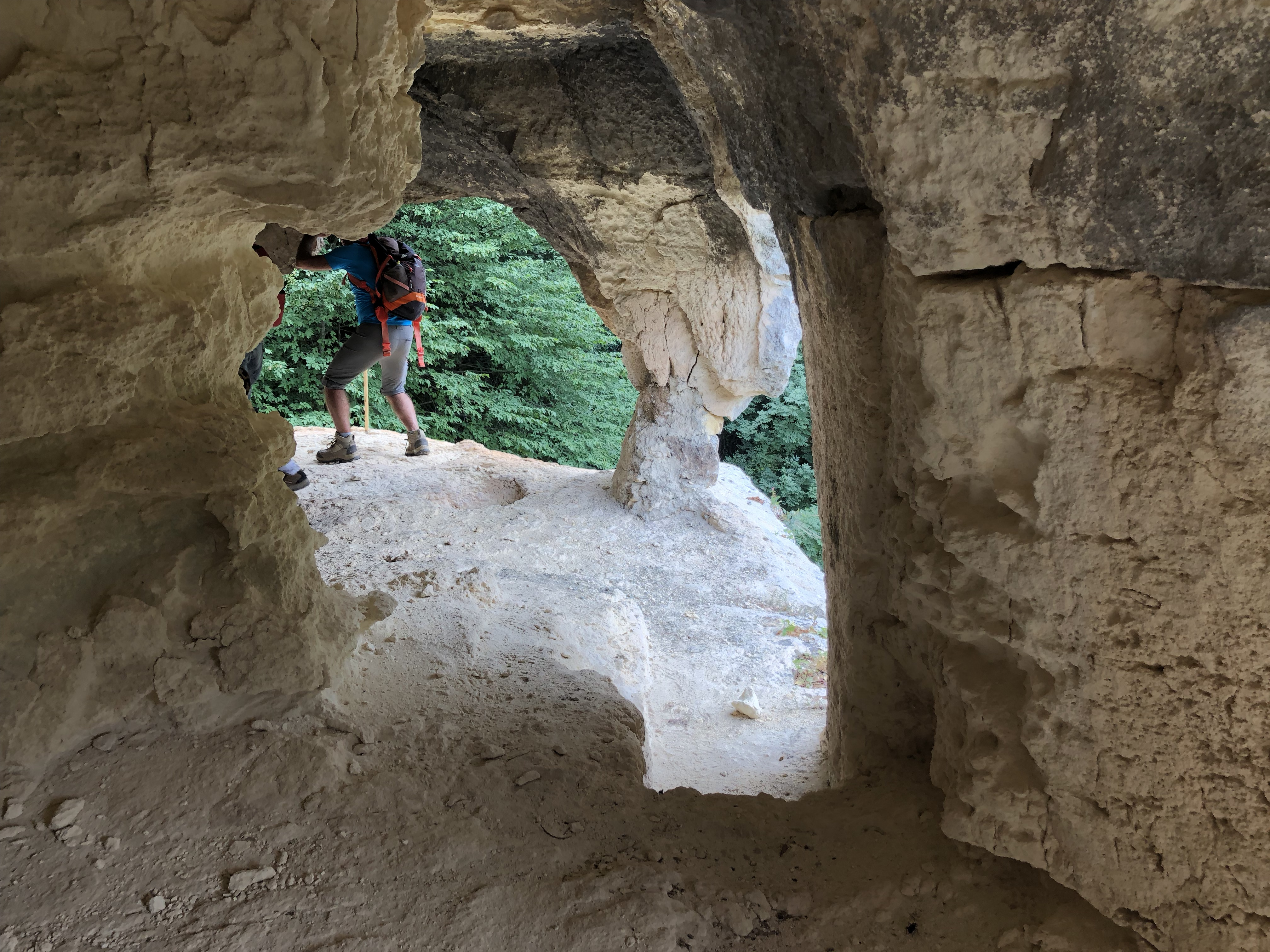 Ambienti rupestri specchi